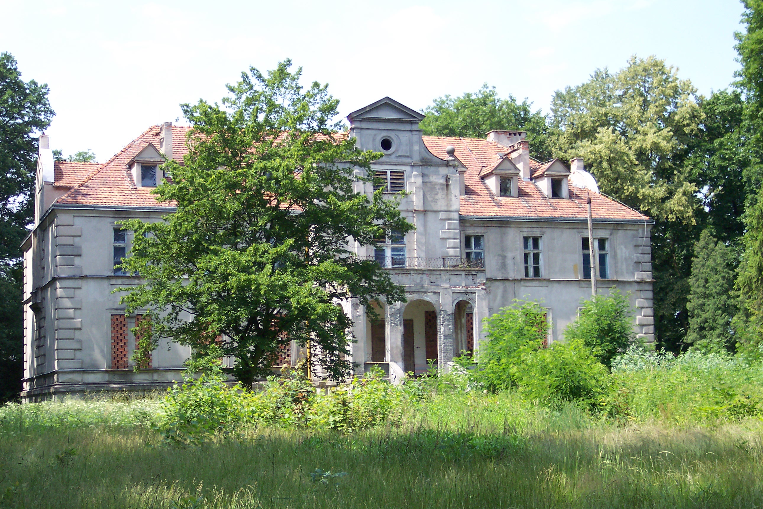 Palast in Gwoździany